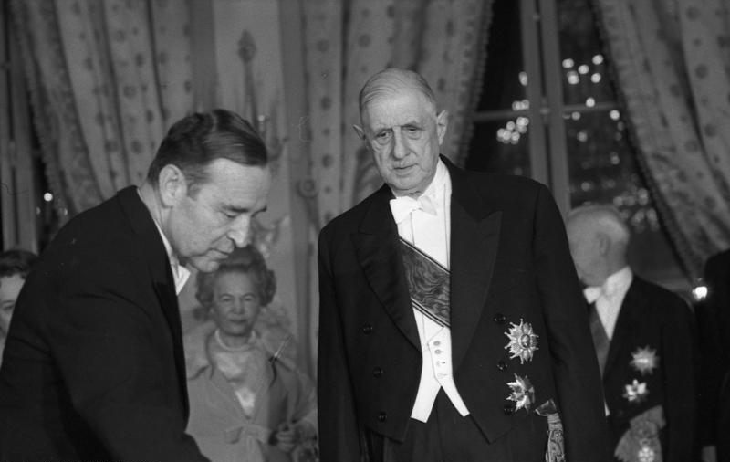 Einweihung der deutschen Botschaftsresidenz, Palais Beauharnais, in Paris. 23-34 Empfang für Staatspräsident de Gaulle.